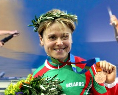 Natallia Tsylinskaya